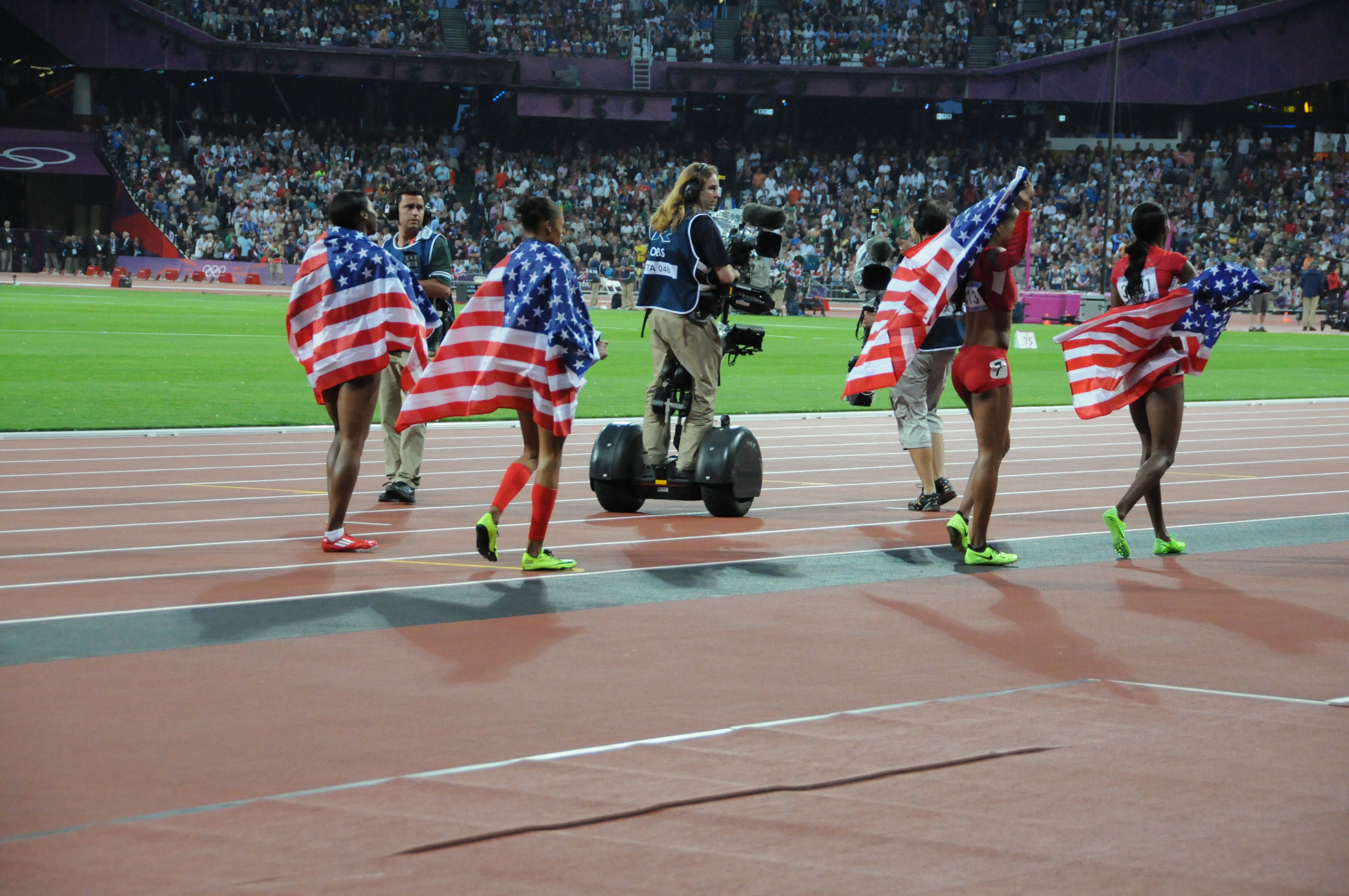 L'équipe américaine faisant le tour d'honneur après sa victoire au relais 4x400 aux JO Londres 2012